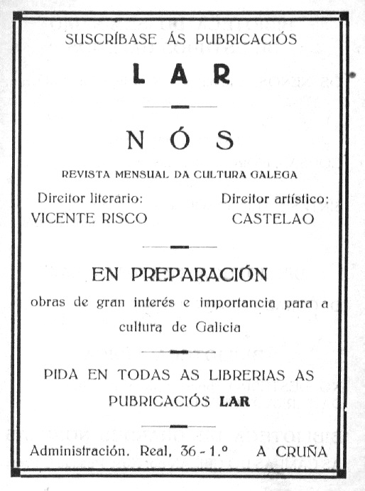 Suscríbase ás pubricaciós LAR